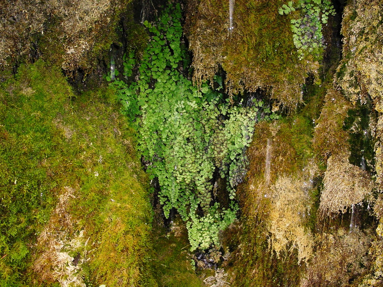 Parco dei Nebrodi, Sicily Adiantum capillus-veneris